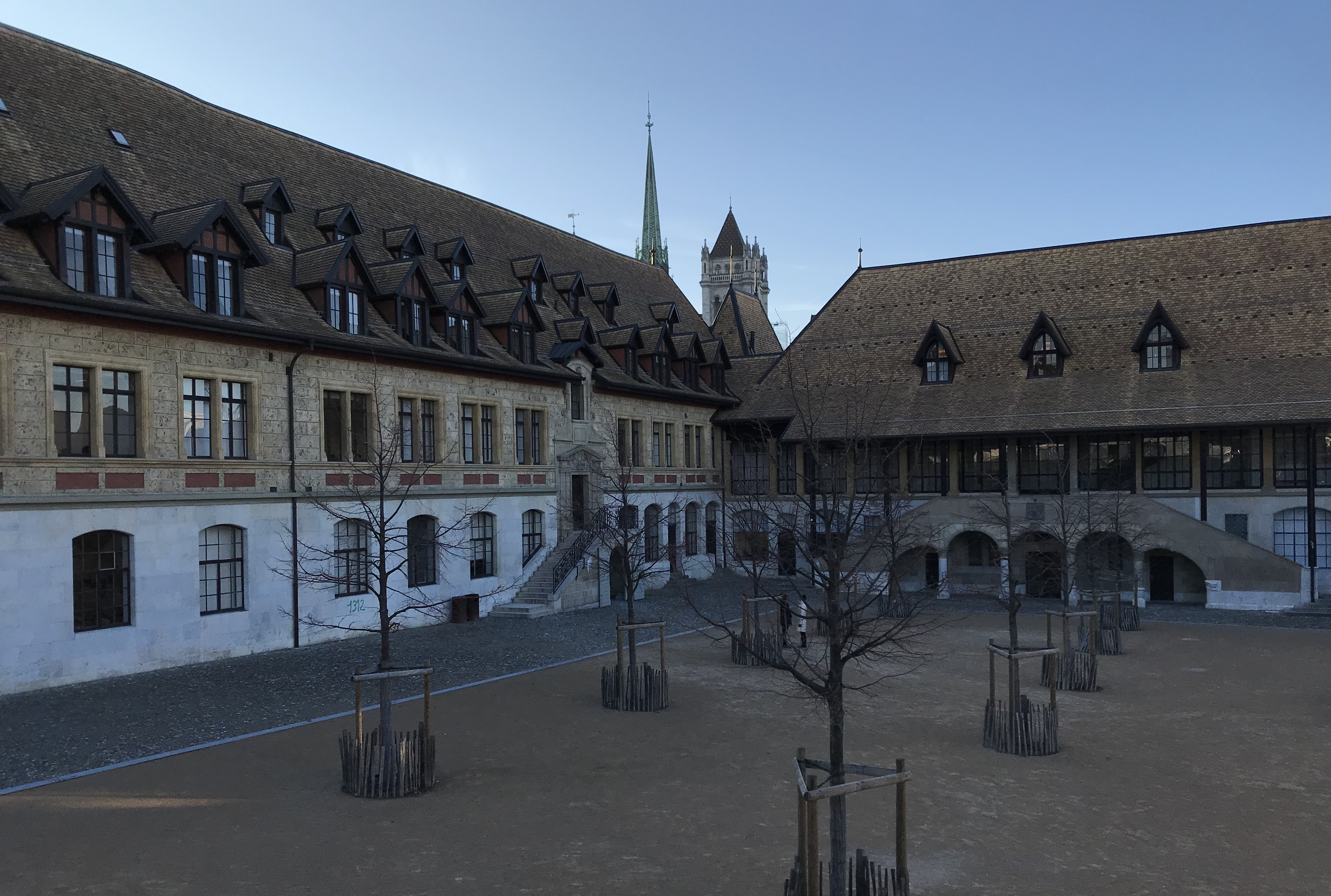 La cour du Collège Calvin, le 14 février 2019.